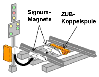 Integra-Signum-Magnet und ZUB-Gleiskoppelspule